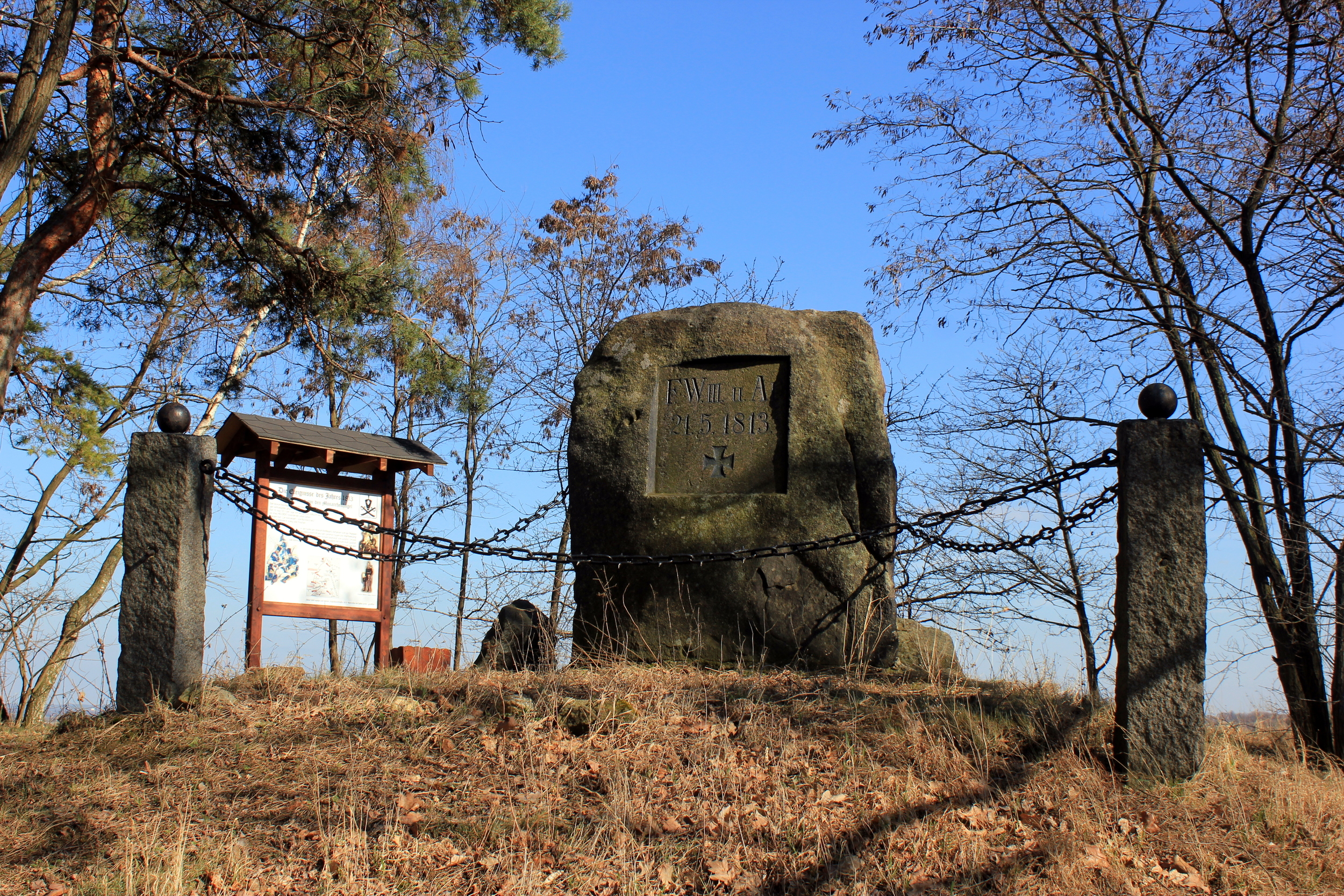 Hornjoserbsce: Monarchowa hórka pola Jenkec.